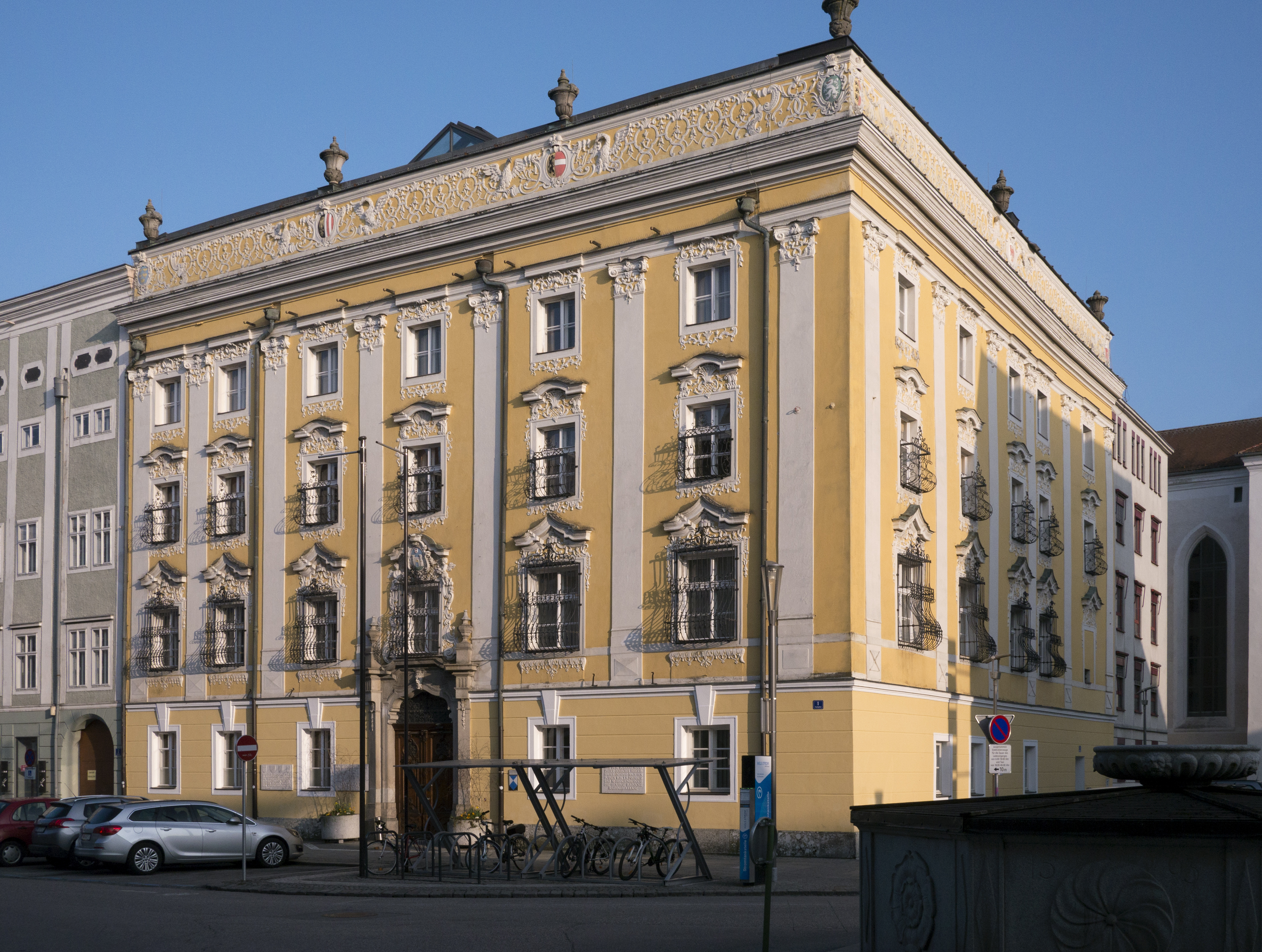 Rathaus